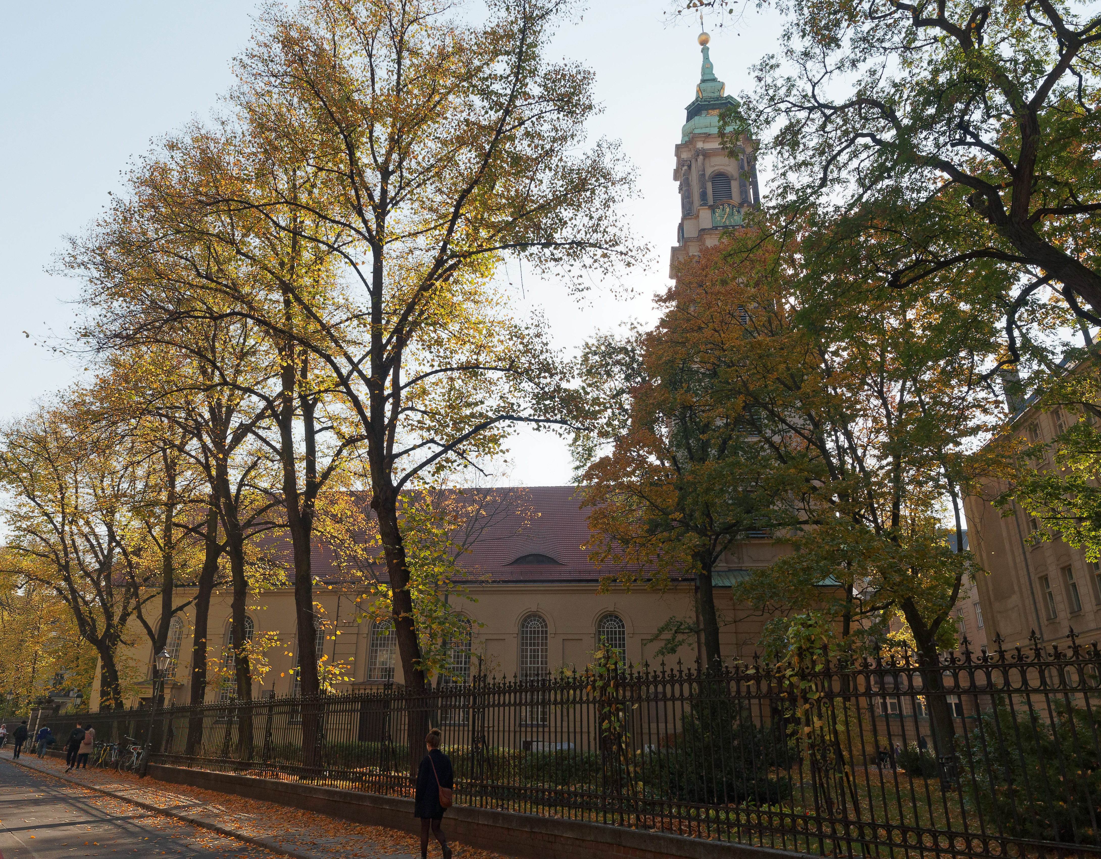 Berlin-Mitte, Sophienstraße mit SophienkircheThis is a photograph of an architectural monument.